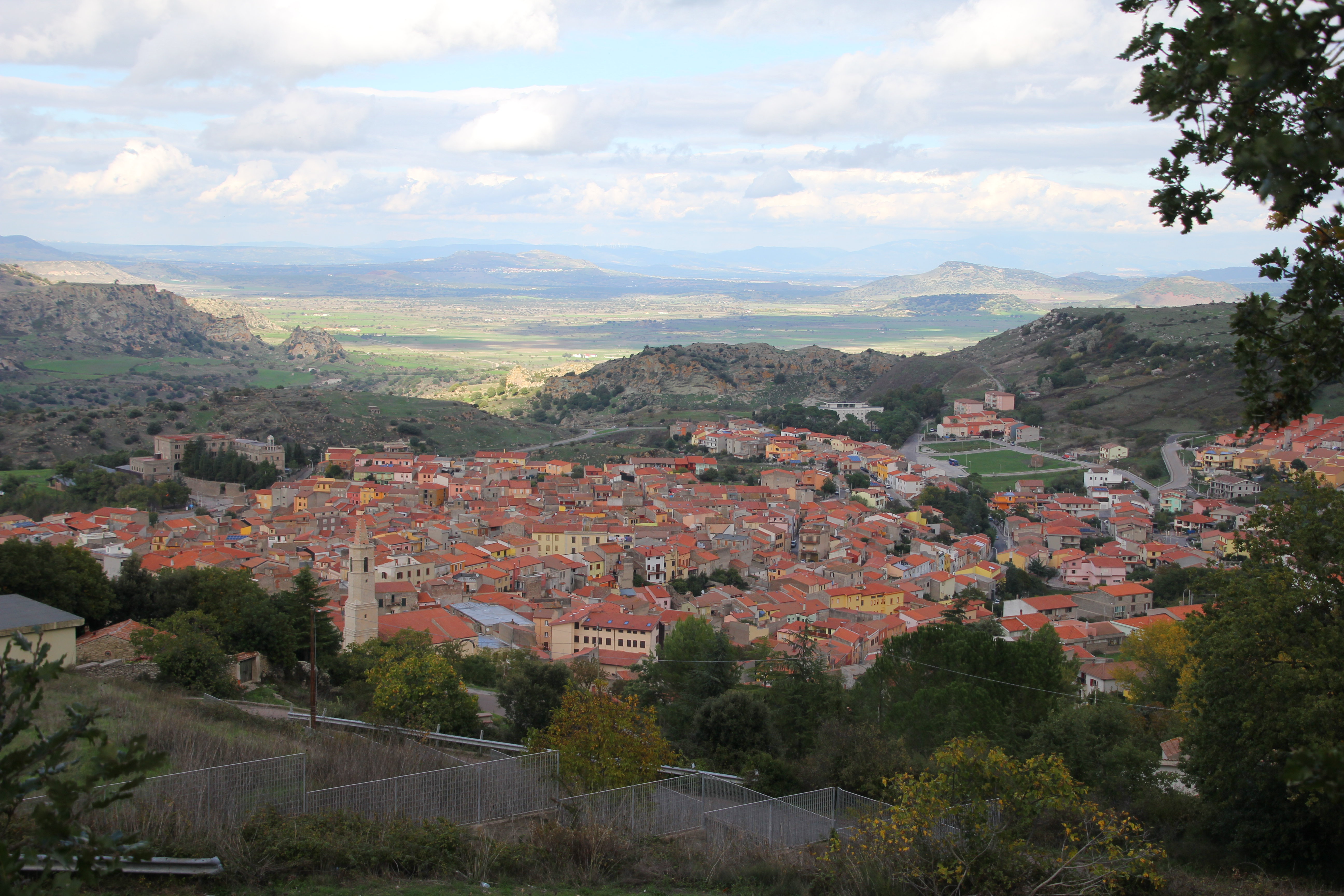 Bonorva - Panorama